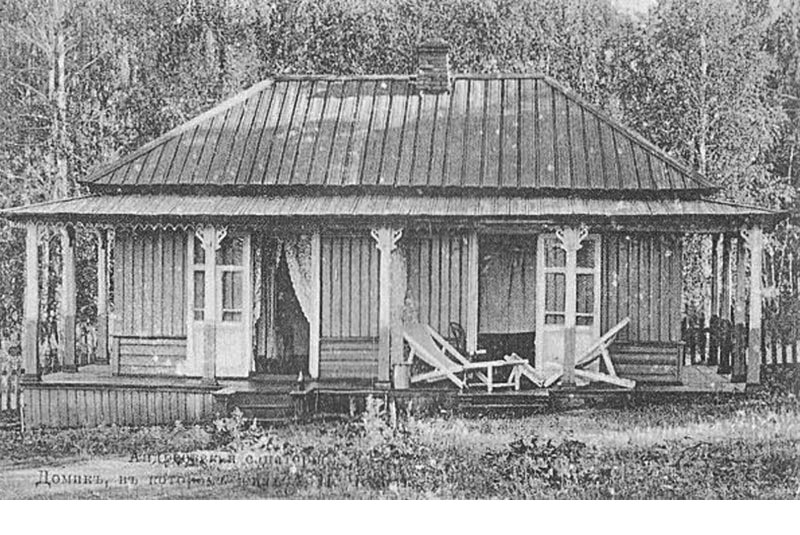 Чехов в Андреевском-санатории, дом, у котором жил писатель, 1901 год